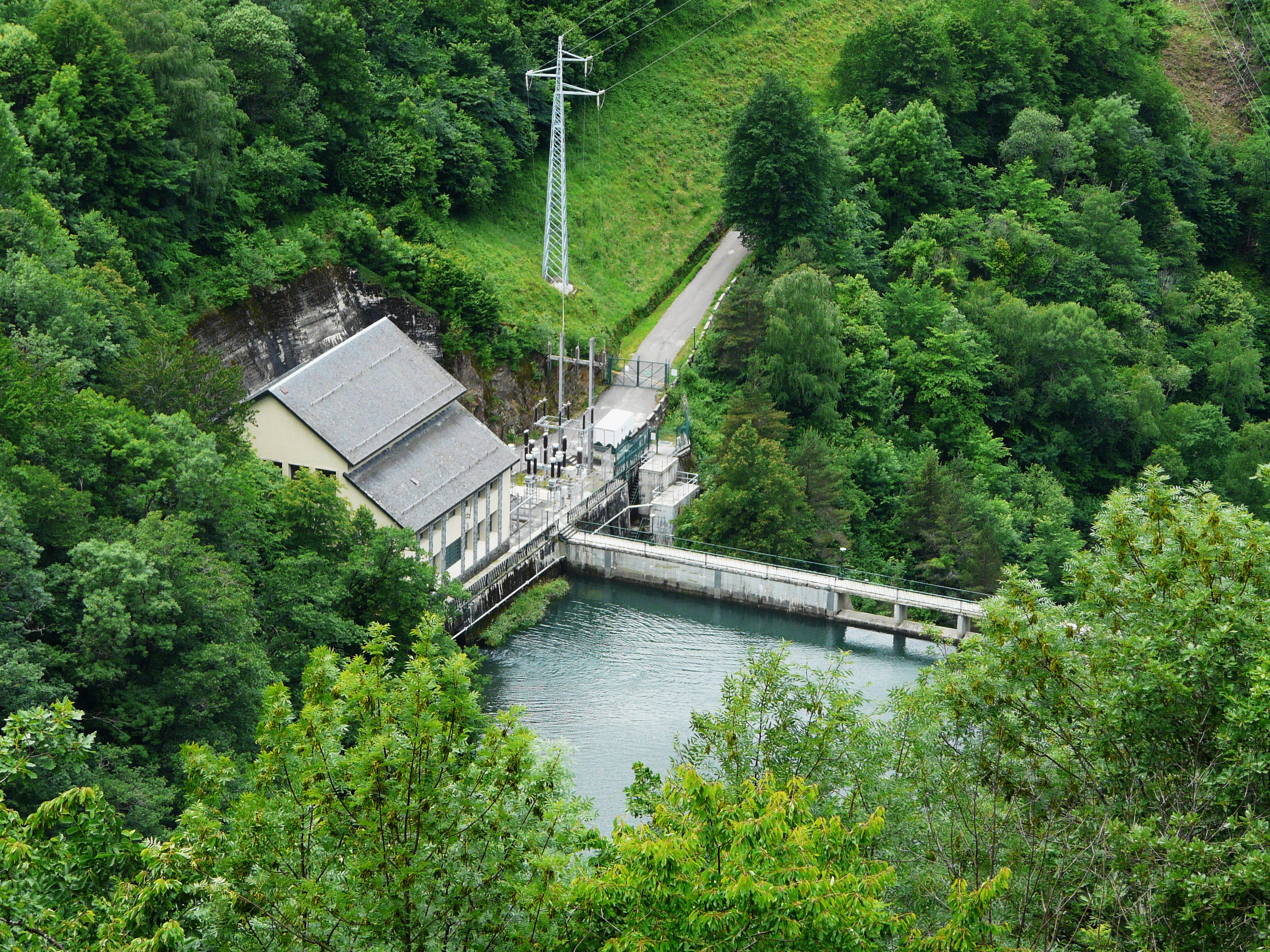 La centrale hydroélectrique sur le rio Toran, Canejan, Val d'Aran, Espagne.